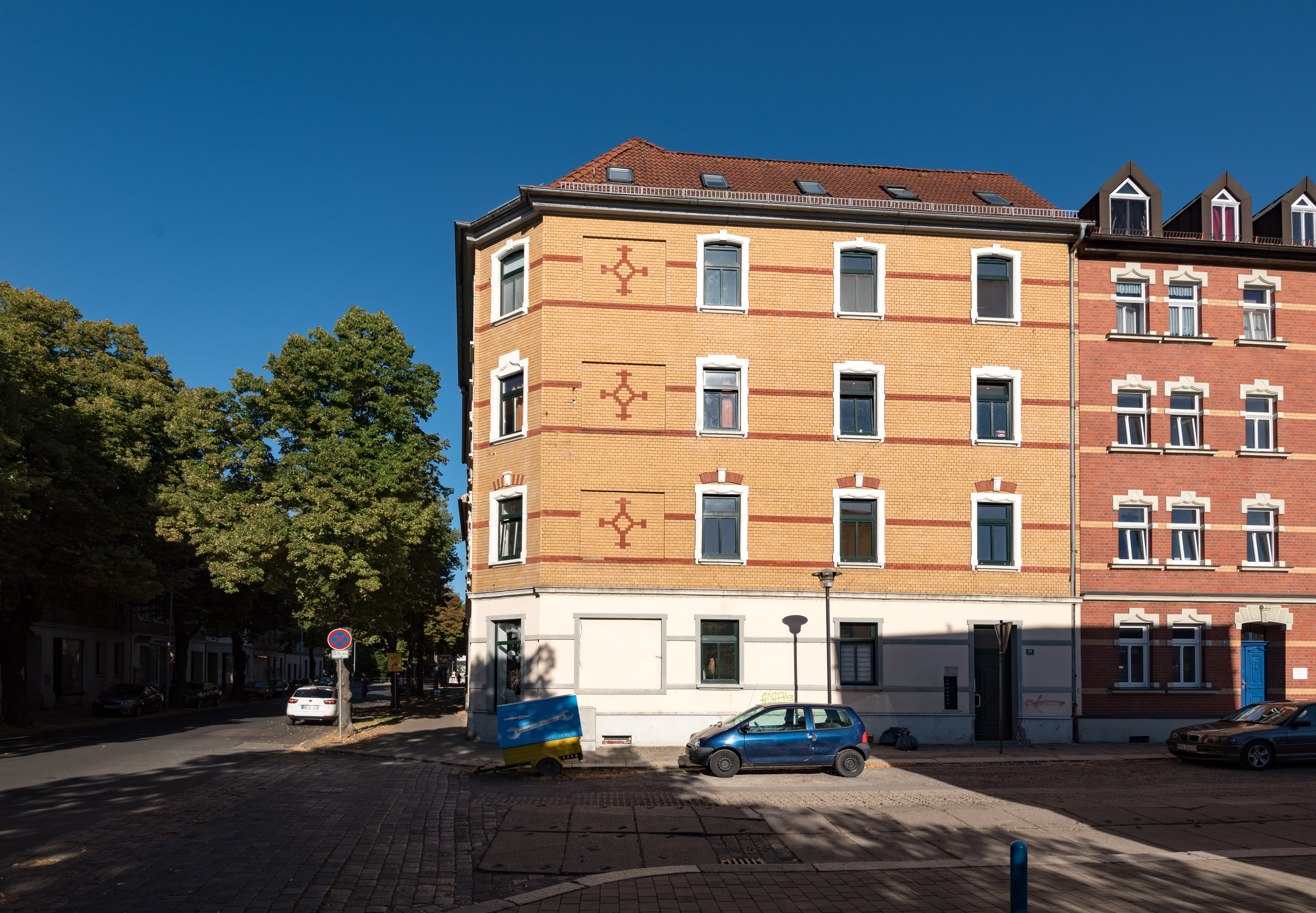 Weißenfels, Beuditzstraße 46